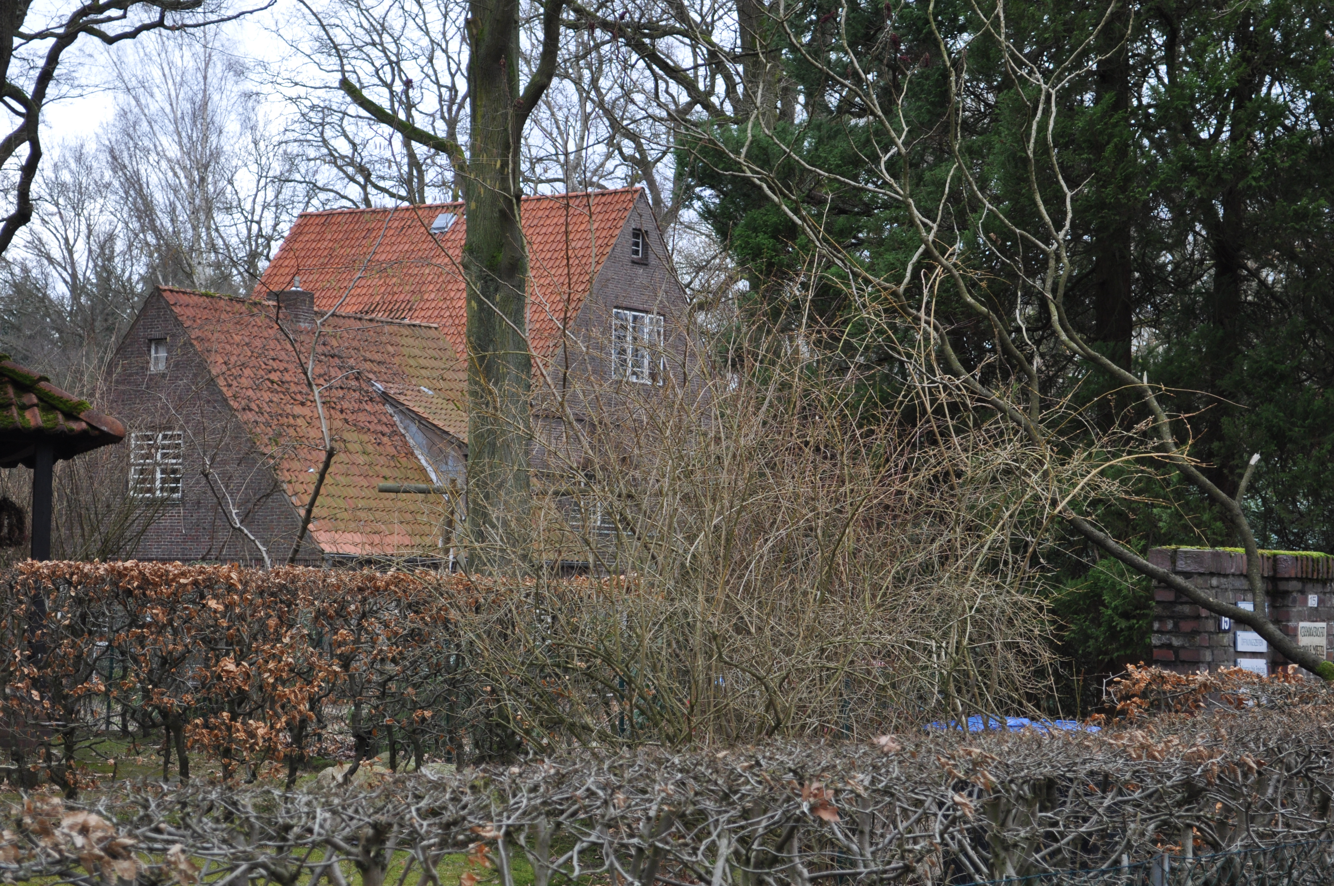 Haus der Künstlerfamilie Maetzel, Langenwiesen 15 in Hamburg-Volksdorf This is a photograph of an architectural monument.